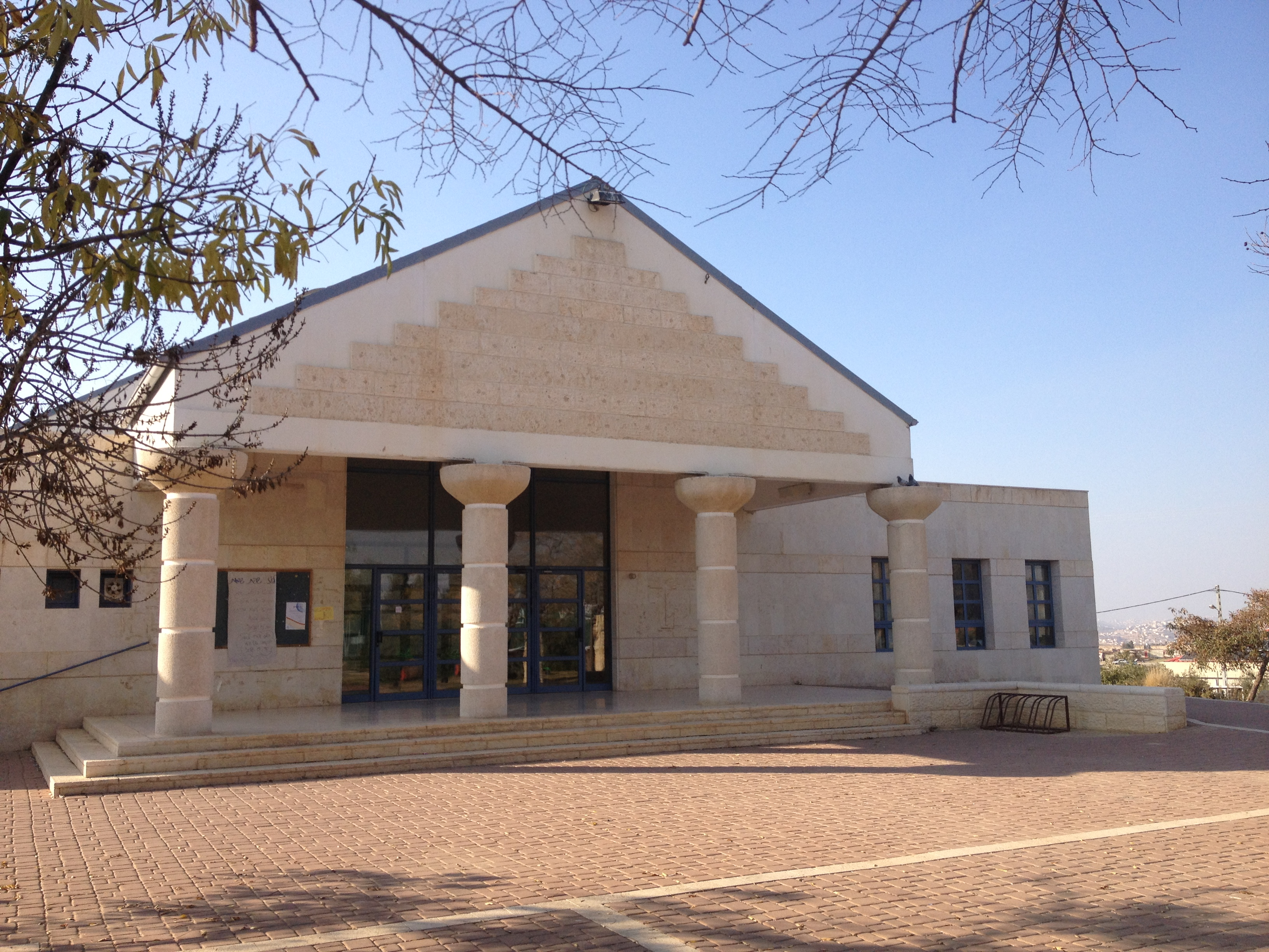 סוסיא בית הכנסת